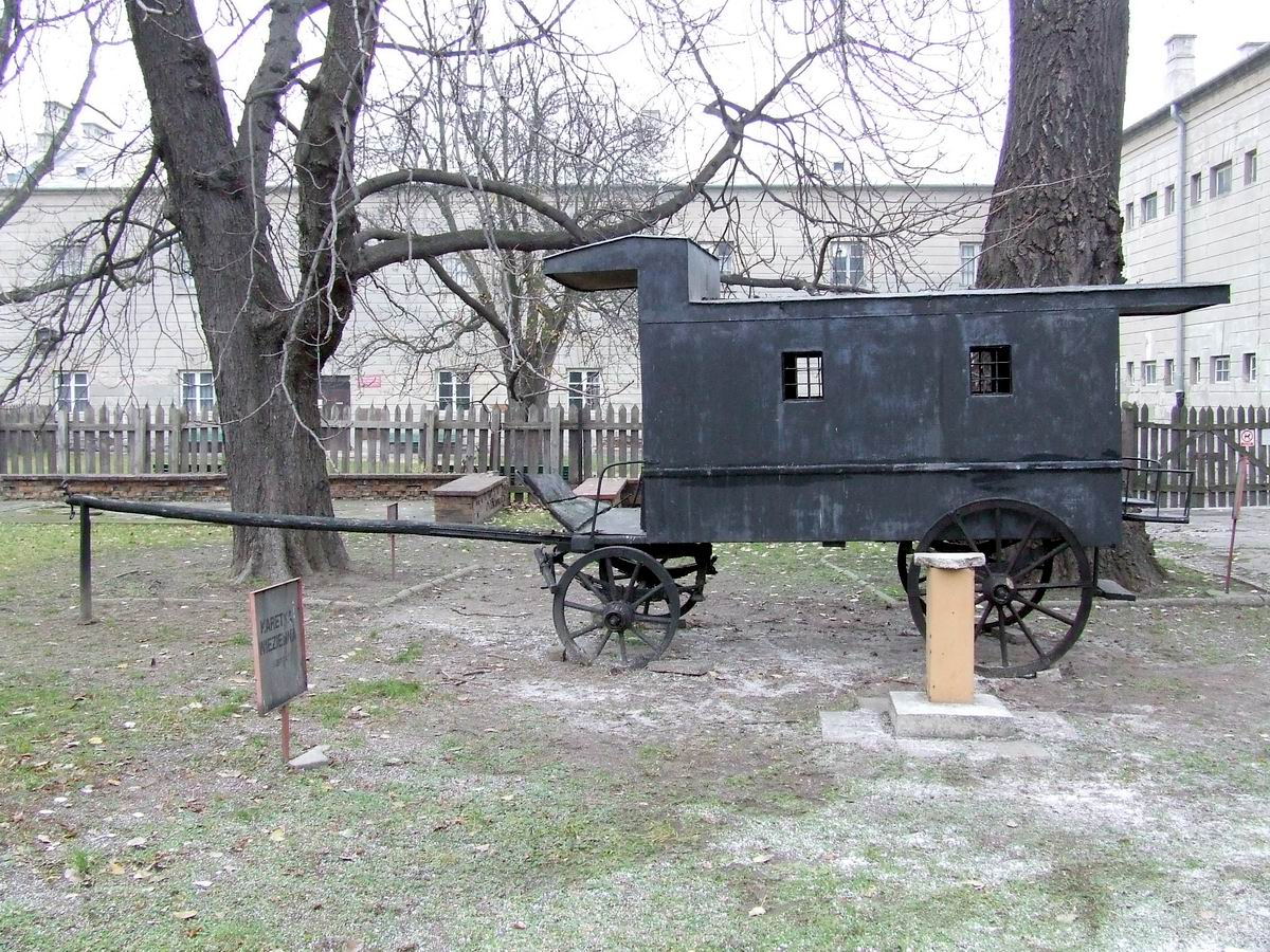 Kibitka do przewozu więźniów, Cytadela Warszawska, X Pawilon.